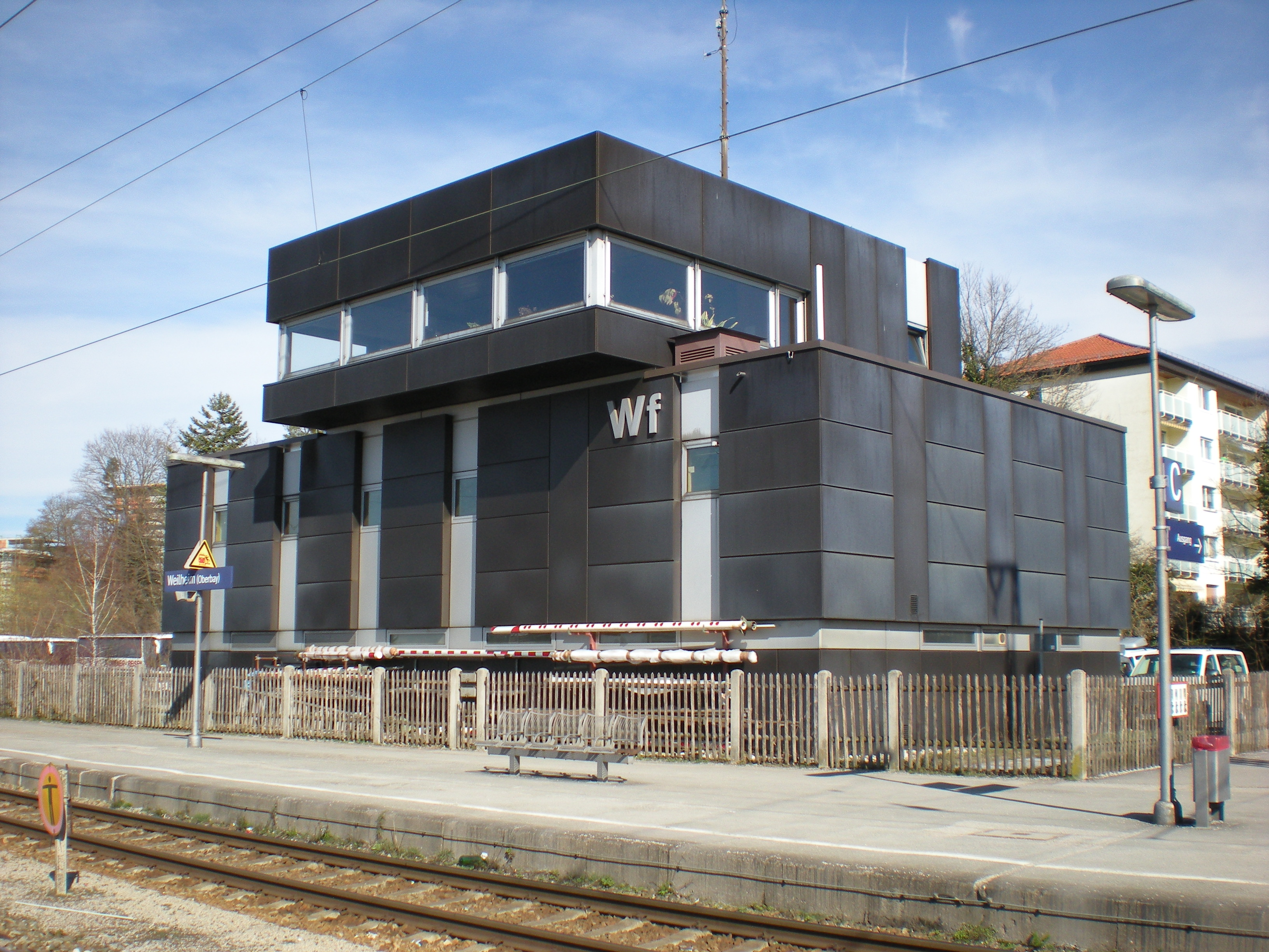 Spurplandrucktastenstellwerk am Bahnhof Weilheim